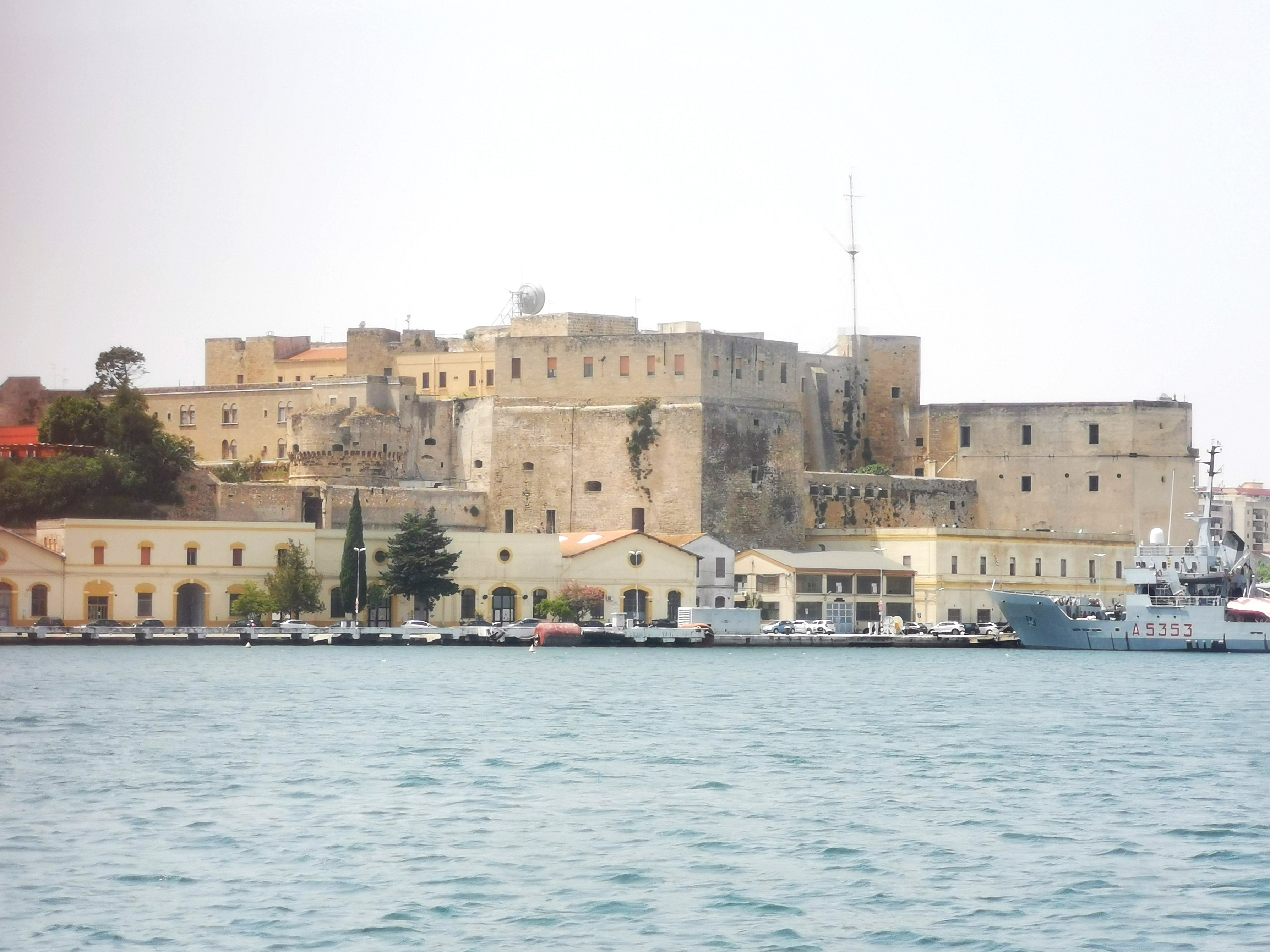 Castello svevo di Brindisi visto dal lungomare. La nave a destra è la San Giusto, nave d'assalto anfibio della Marina Militare Italiana.